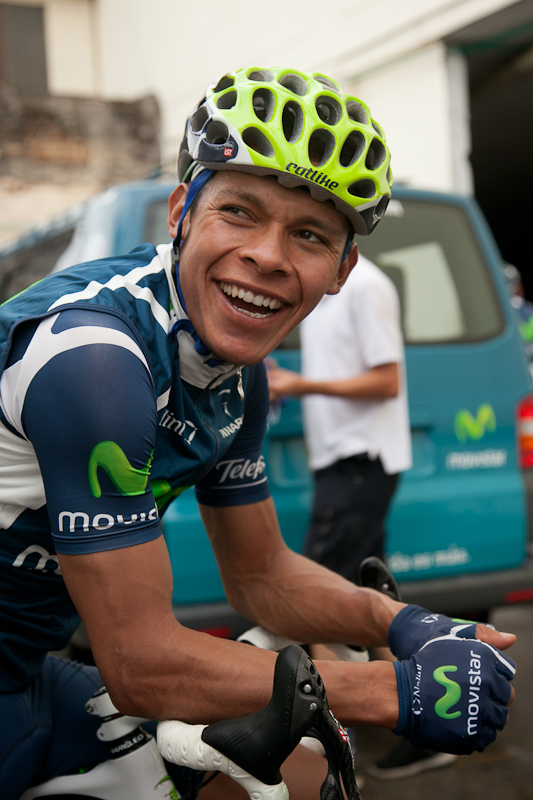 Ciclista colombiano Freddy Montaña en la Vuelta a Colombia 2012